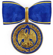 Знак отличия «За благодеяние» (Российская Федерация) Лицевая сторона